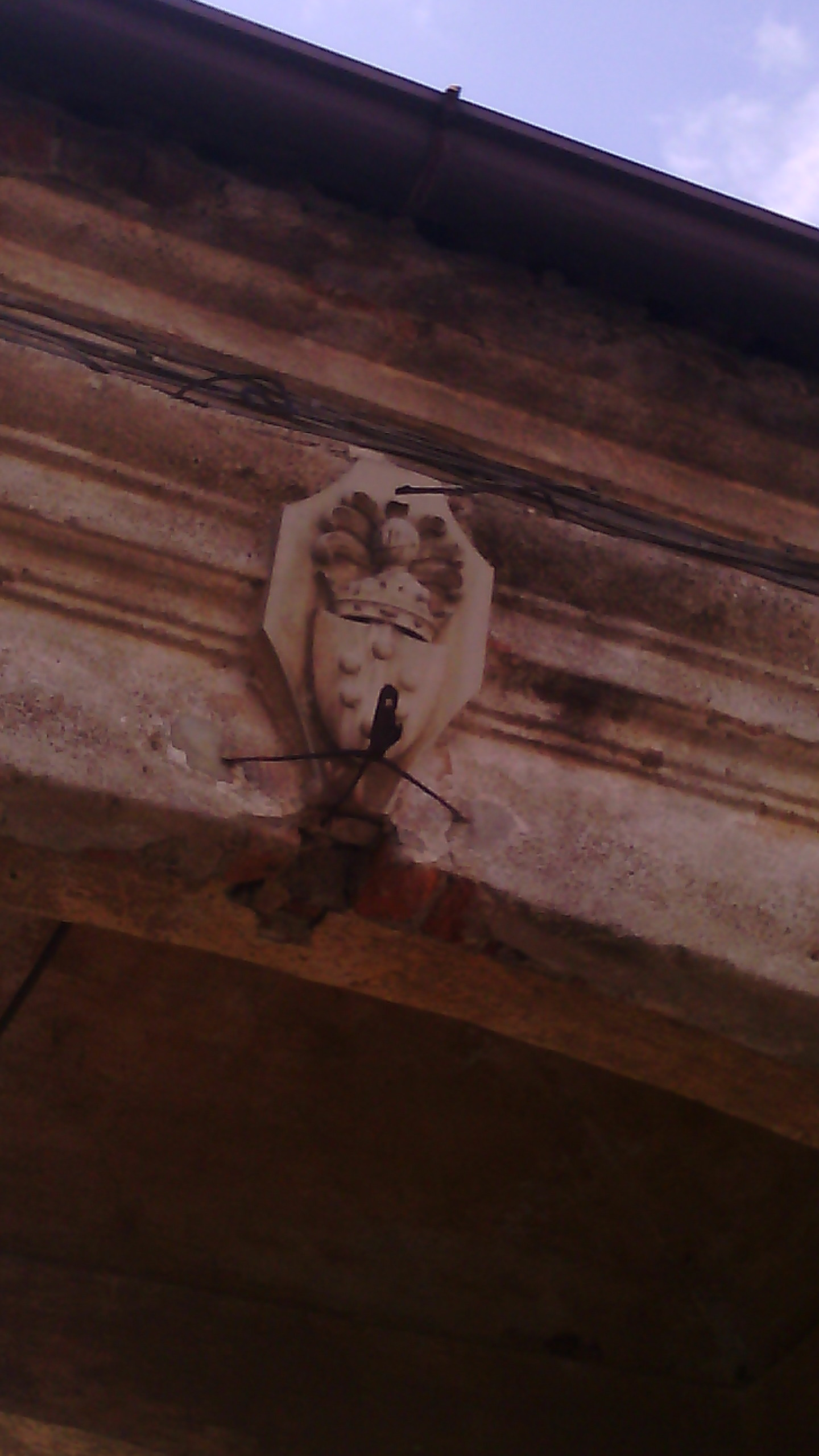 Stemma dei marchesi Medici sulla corte principale di Fagnano, Gaggiano (MI)